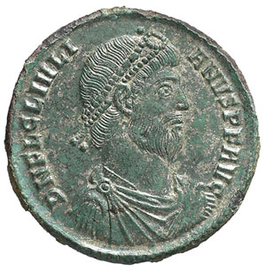 Maiorina di bronzo, gr. 7,86; Flavio Claudio Giuliano. Iscrizione: D/ DN FL CL IVLIANVS PF AVG